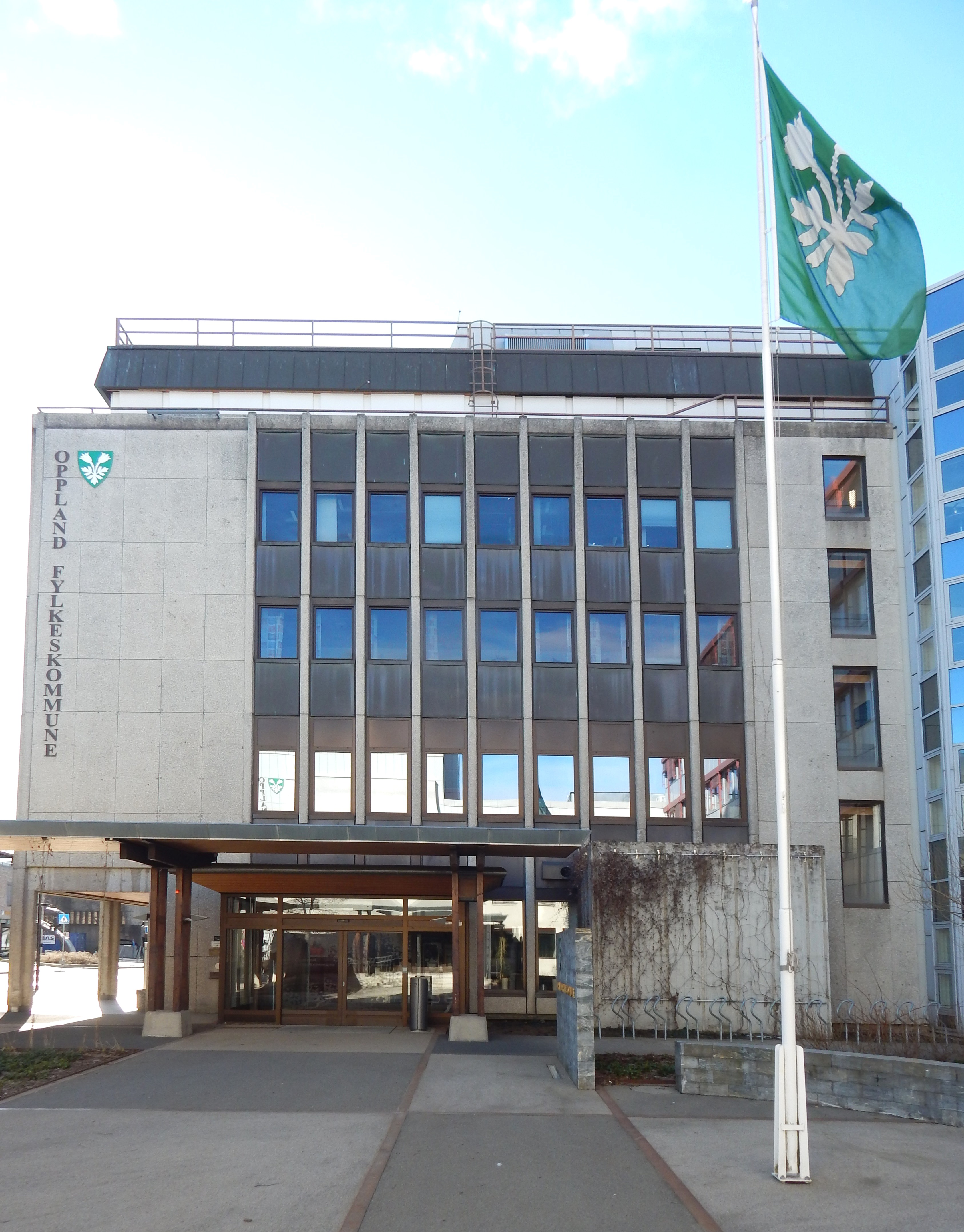 Fylkeshuset på Lillehammer, med administrasjon for Oppland fylkeskommune